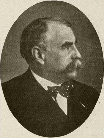 Willem Voormolen (1856 - 1909), burgemeester van Veendam (1888-1891) en Doesburg (1891-1893) en daarna hoofdcommissaris van politie te Rotterdam (1893-1907)